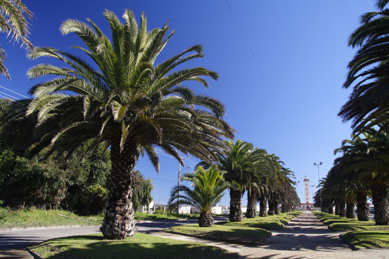 Palms in Av. Francisco de Aguirre in La Serena, Chile